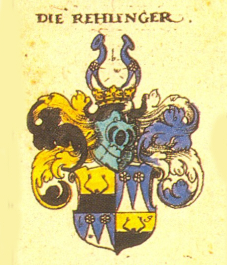 Wappen der Augsburger und Nürnberger Patrizierfamilie Rehlinger - Linie ????